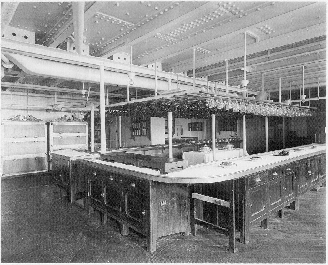 Кухня обеденных салонов первого и второго класса на "Олимпике"